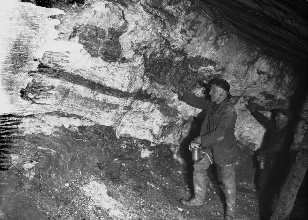 Abstract: Miners underground at Pumsaint gold mine